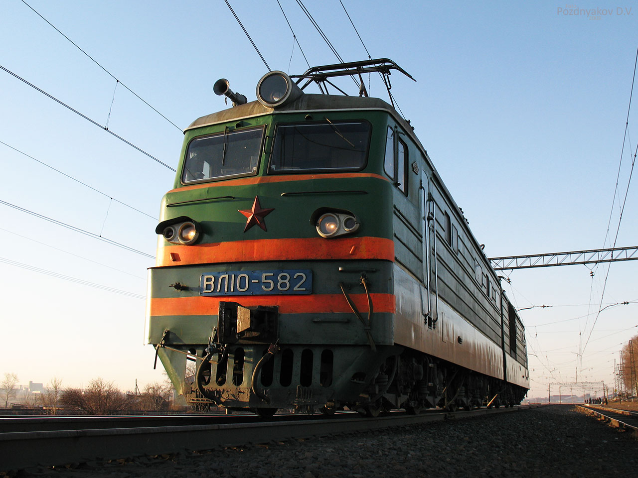 С завода поступил в депо Кинель (04.1970 г.) 1978 — передан в депо Тайга. Позднее — передан в депо Московка (данных нет). 2009(?) — передан в депо Омск. Подменён электровозом в интервале №№ 800-1123, после списания работает под номером ВЛ10-630 КР Челябинский ЭРЗ 10.2004 г.